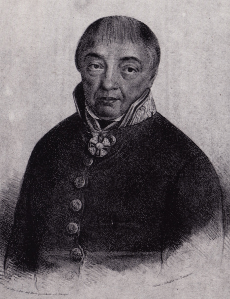 anton ortallo (1777-1844), oberamtmann